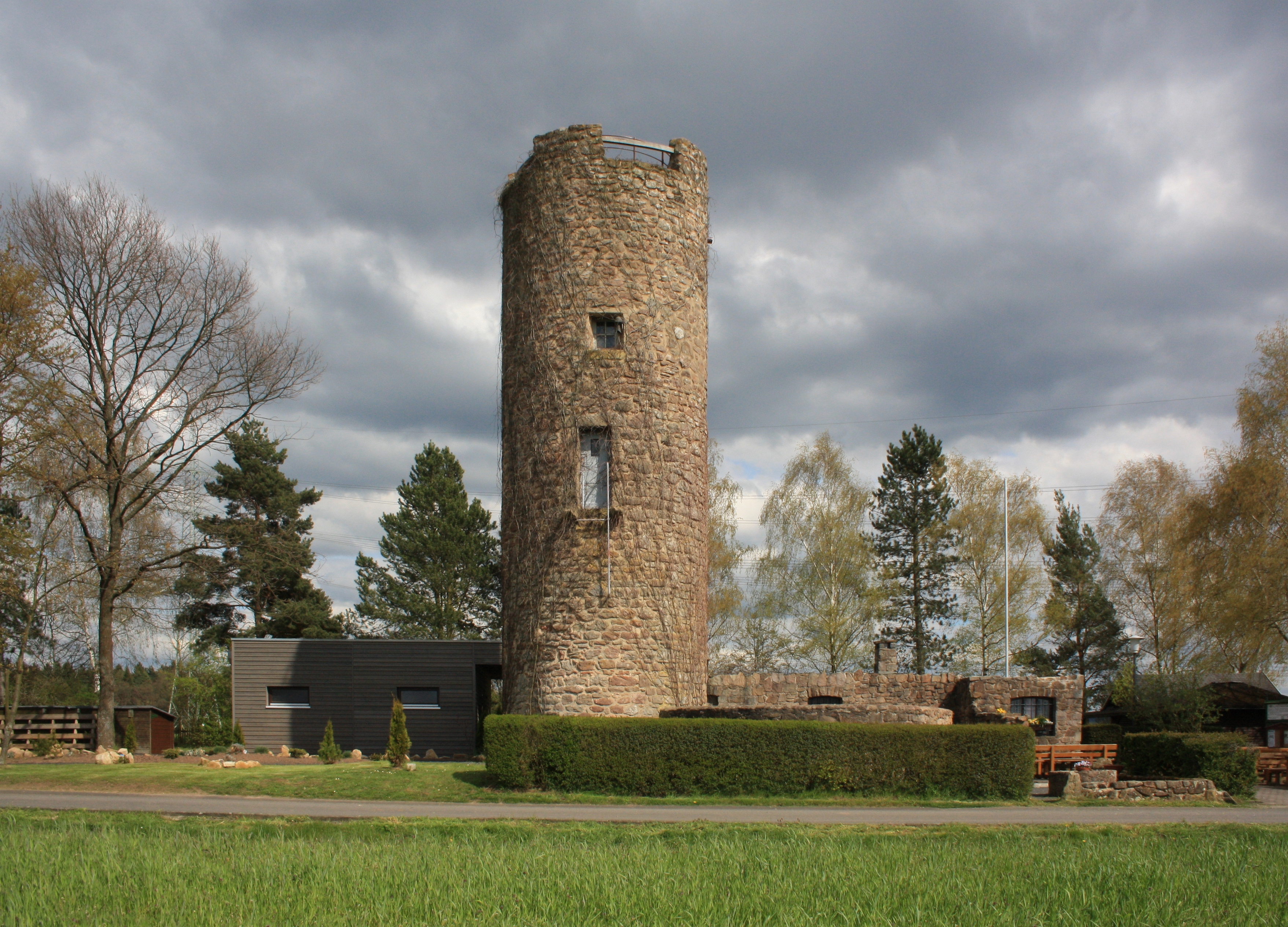 Eichenzeller Warte